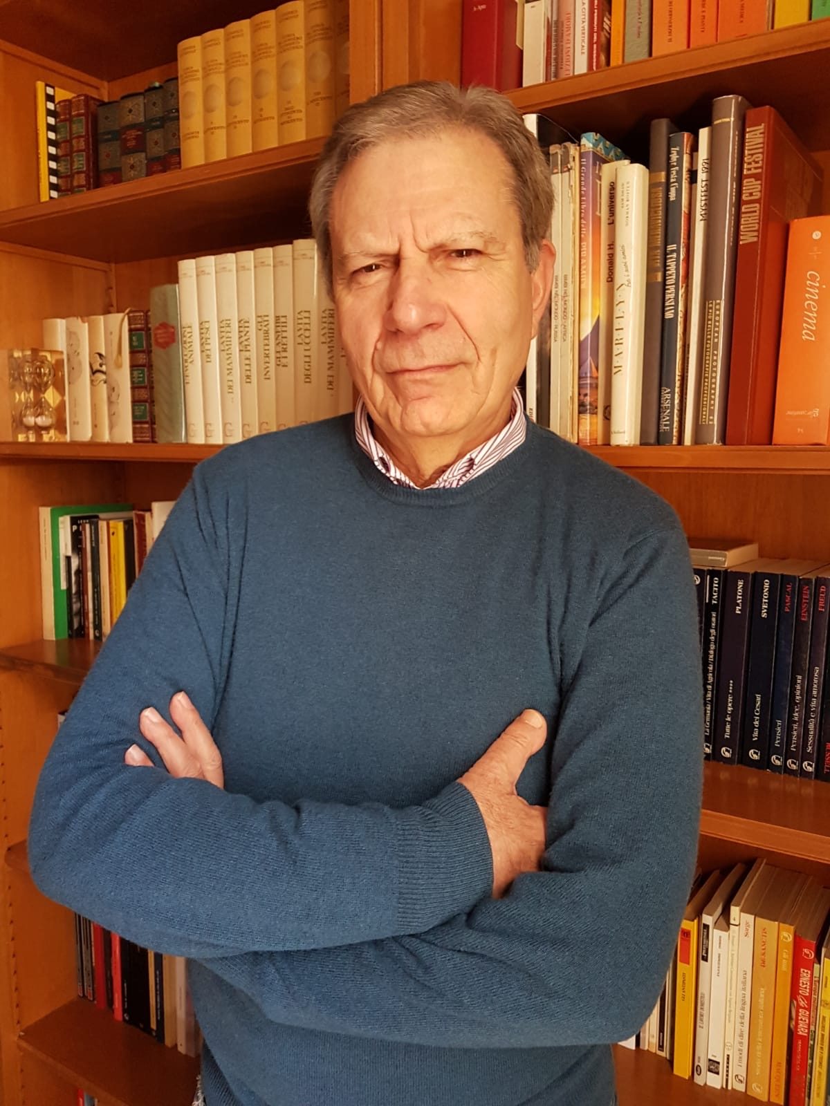 Roma